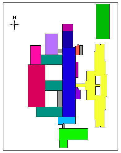 Genordeter Plan des Asklepios Klinikums Uckermark, Schwedt/Oder, Gebäudegrundriss in der Draufsicht, Stand 2020